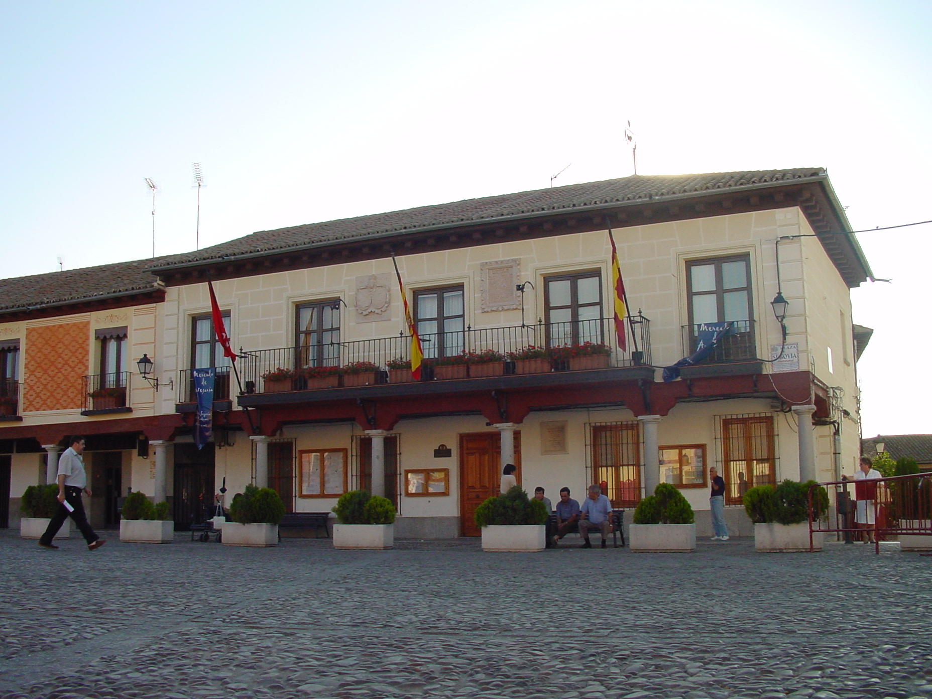 Ayuntamiento de Navalcarnero.